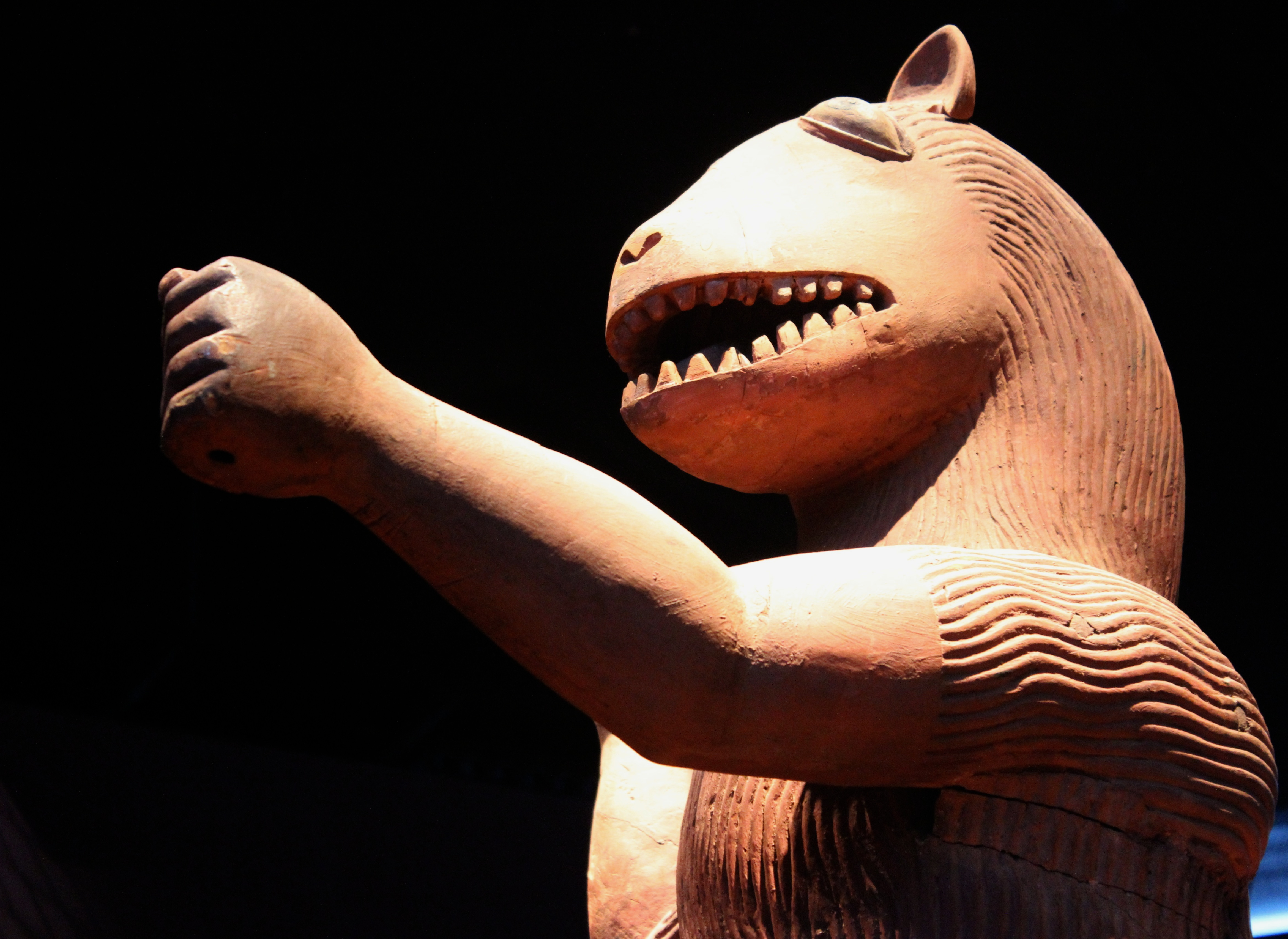 París, Musée du Quai Branly. Estatua del rey Glèlè.